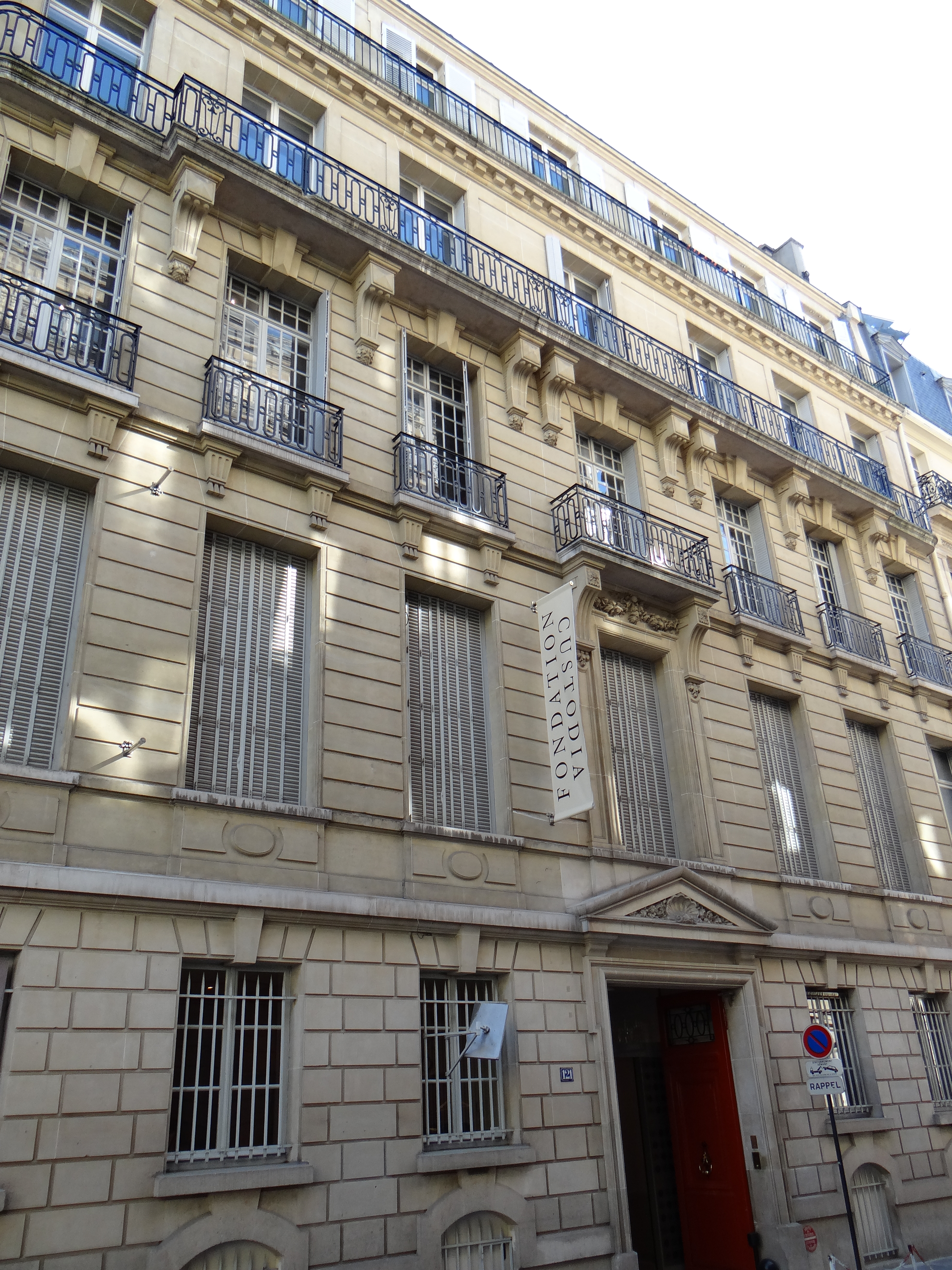 Fondation Custodia - Immeuble 121 rue de Lille